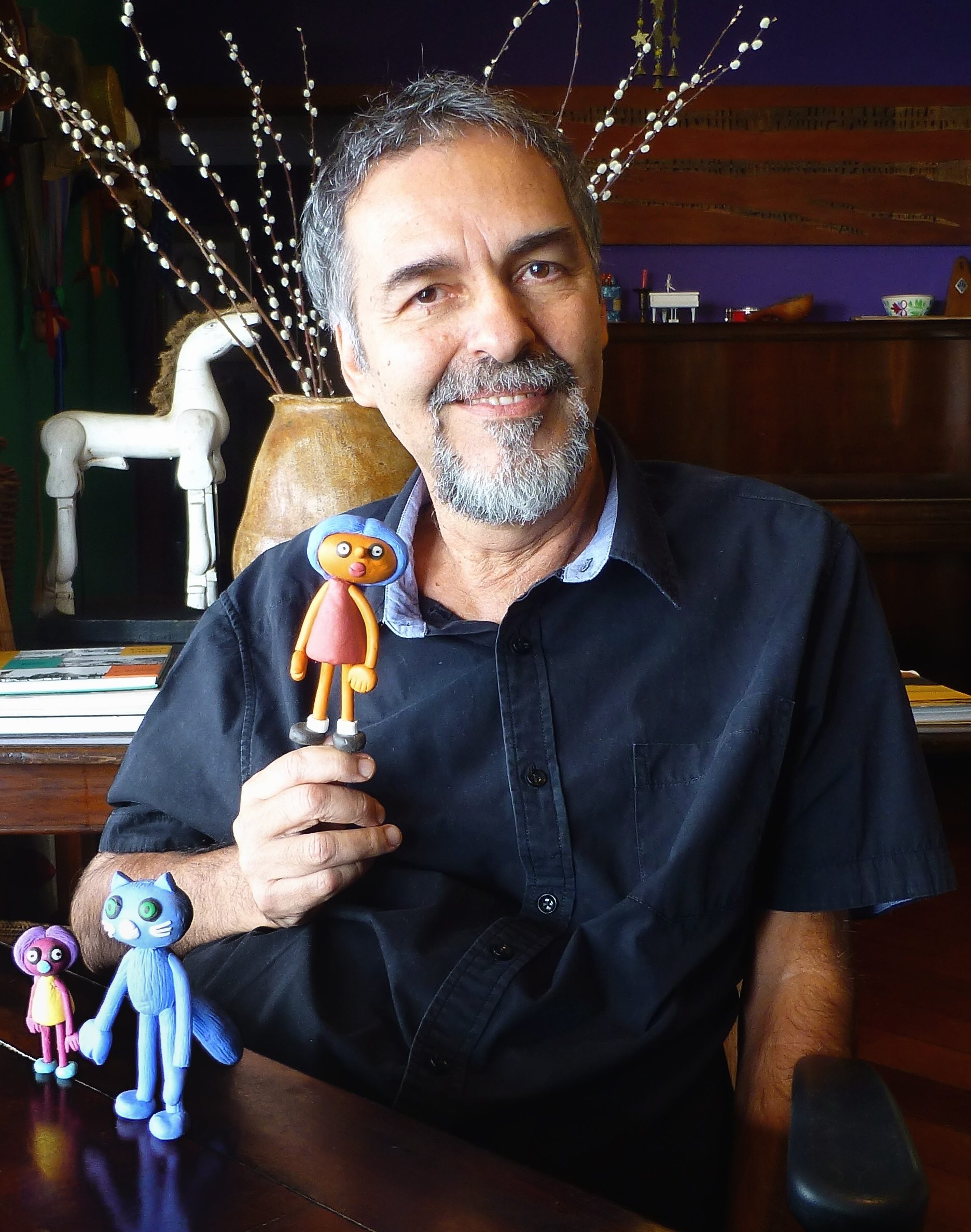 Marcelo Xavier com os personagens do livro "O dia a dia de Dadá" - Dadá, Dadazinha e o Gato.